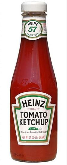 Bouteille en verre classique de Heinz Tomato Ketchup avec le chiffre 57 sur son col.